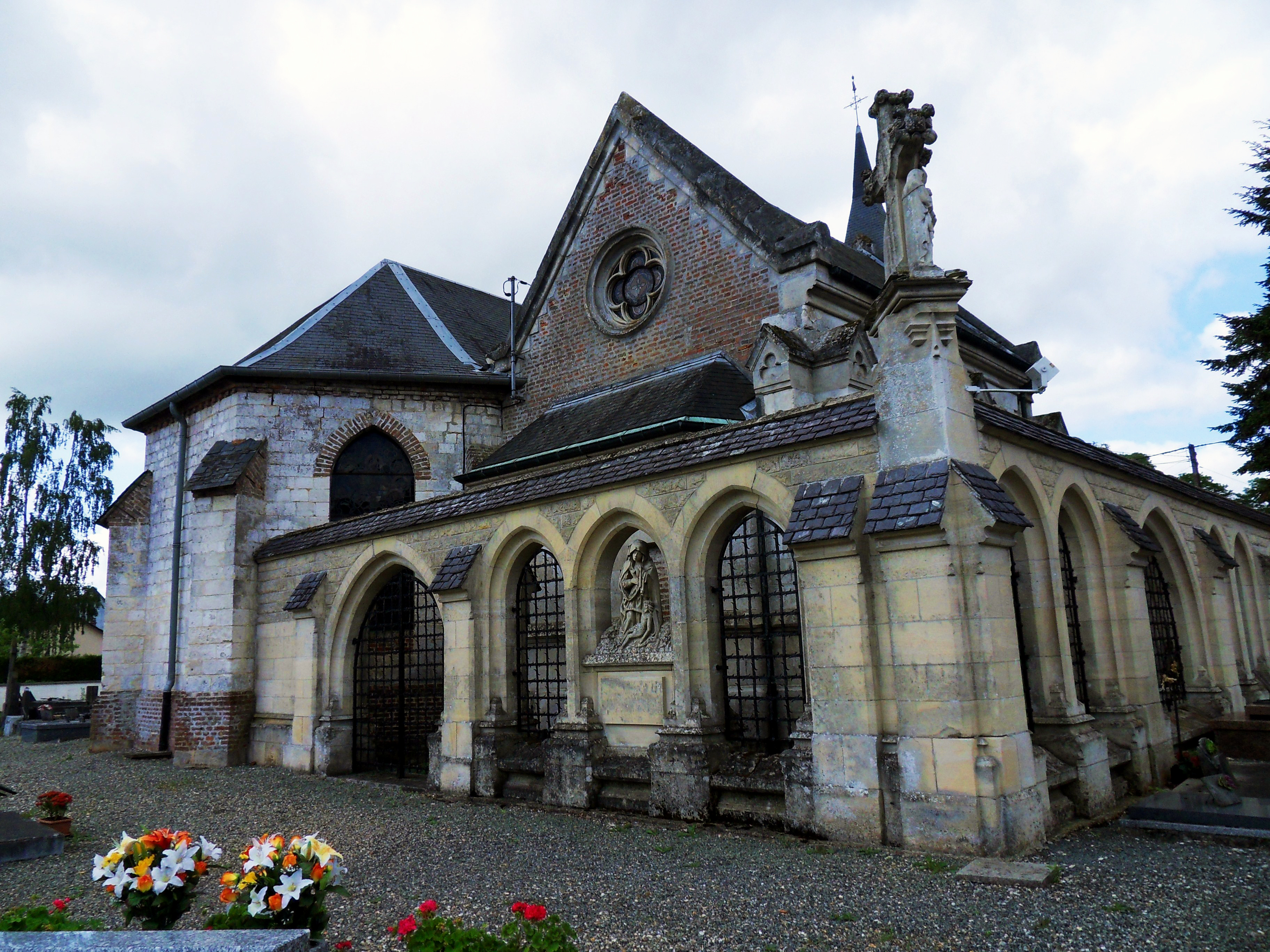 Ribeaucourt (Somme, France). L'église.